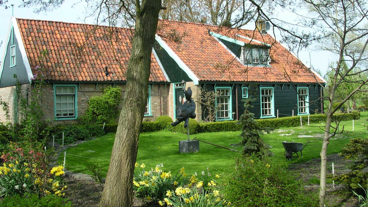 Woongedeelte in de oude stallen van de stolpboerderij Kraaienburg, in Kraaienburg. House in the old animal stalls of the farm Kraaienburg, in the hamlet Kraaienburg.